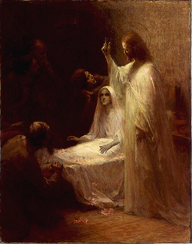 La Résurrection de la fille de Jaïre